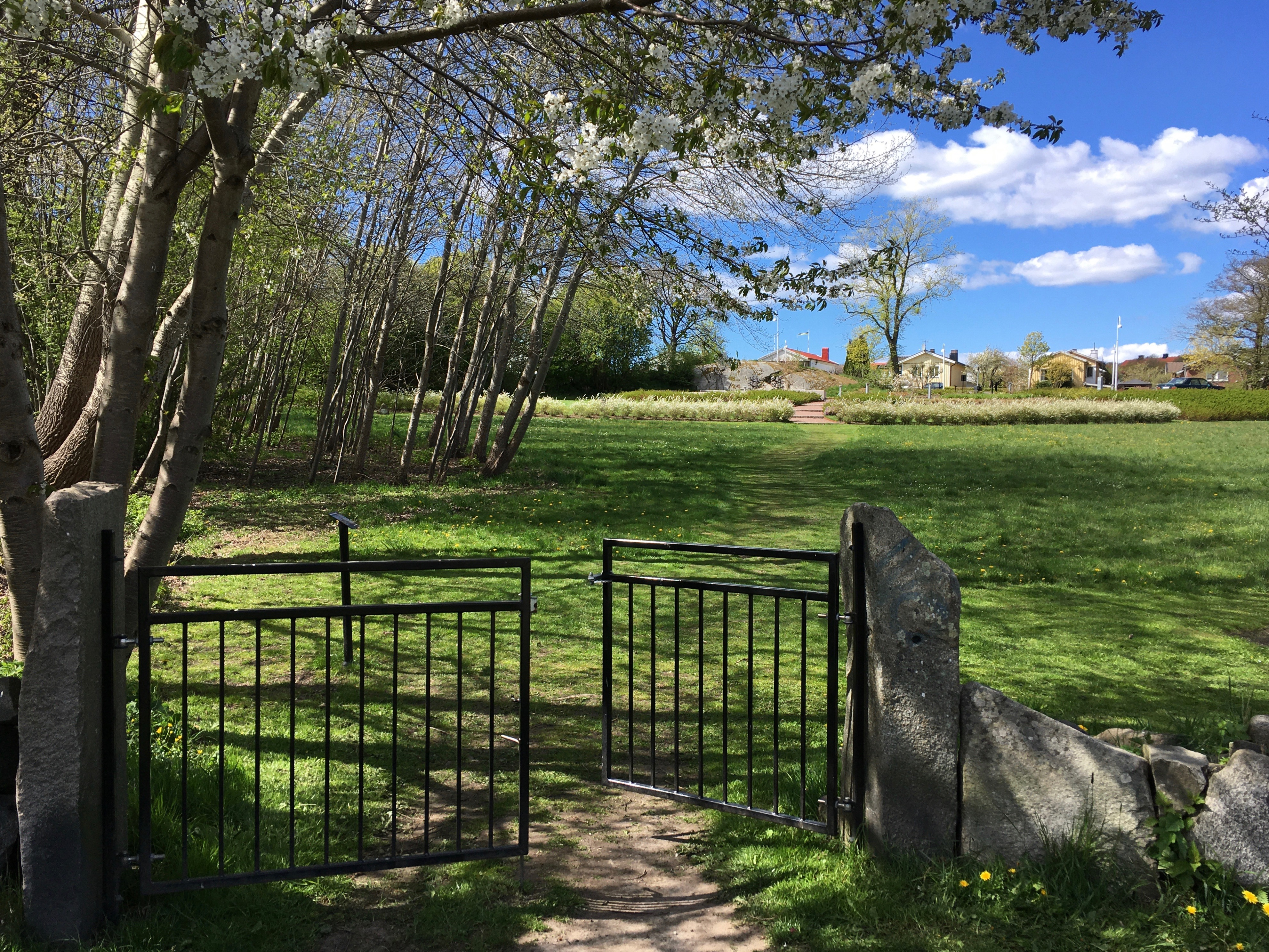 Bräcke askgravlund i Göteborg, tidigare kolerakyrkogård